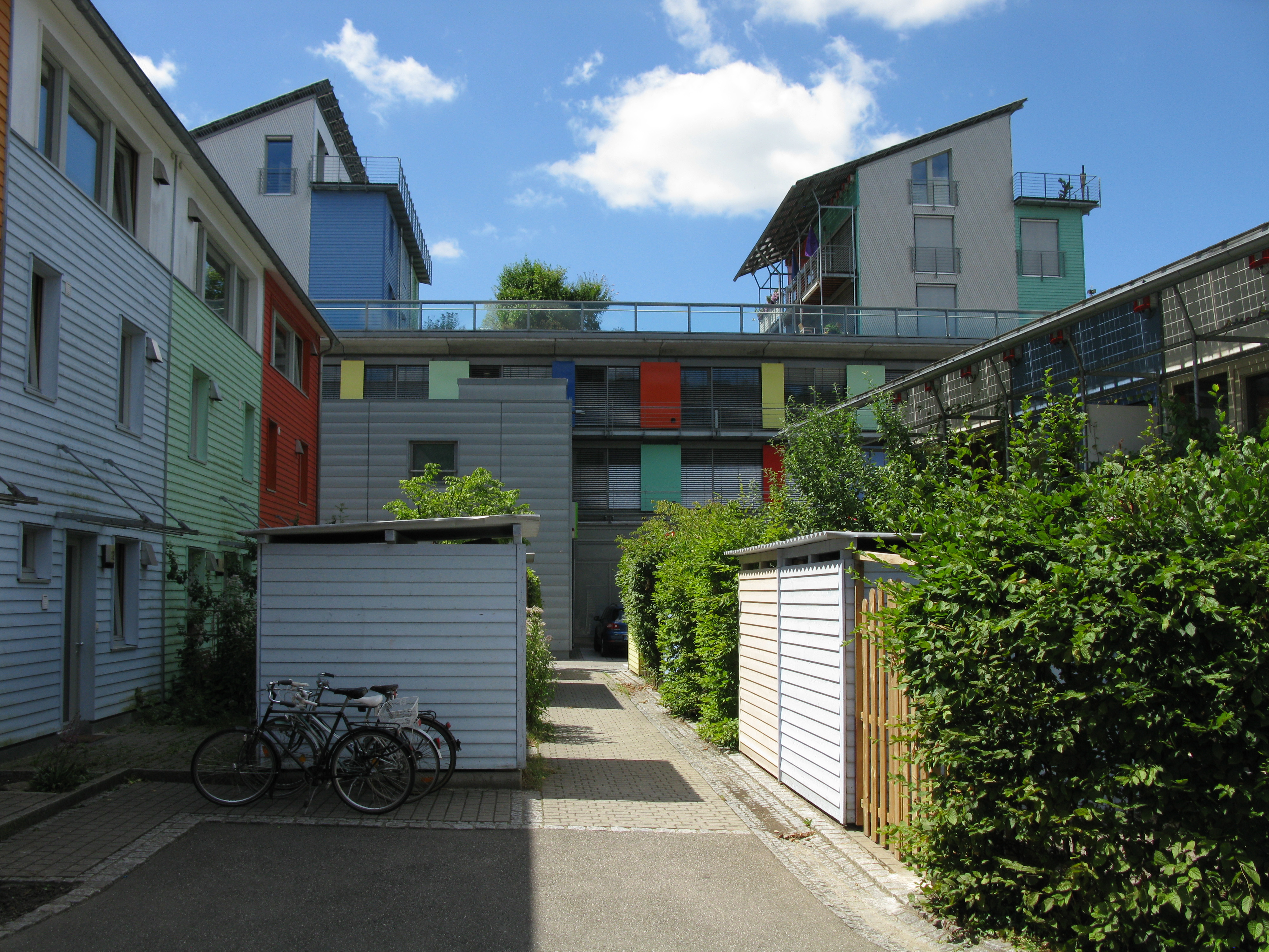 Solarsiedlung in Freiburg-Vauban mit dem Sonnenschiff im Hintergrund